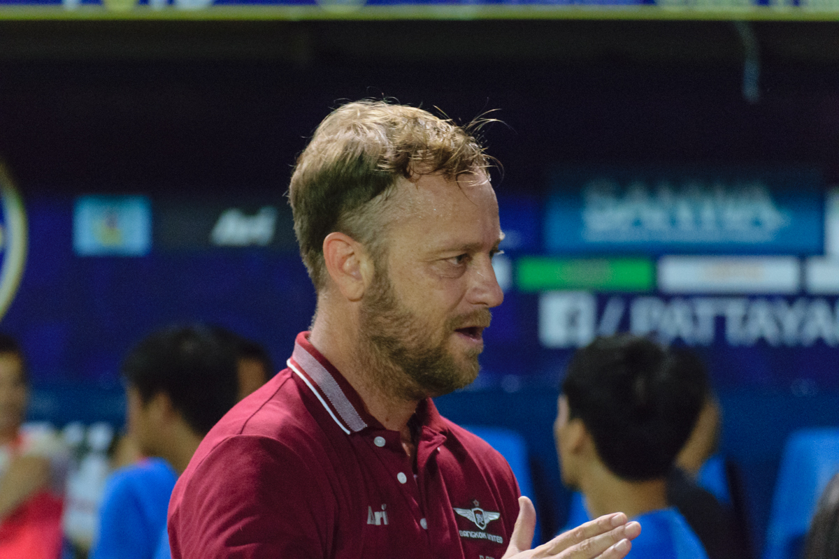 Vander Luiz Silva Souza